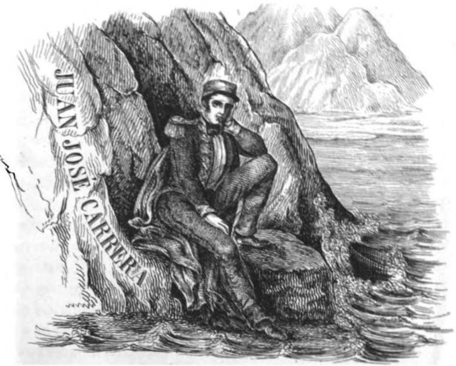 Juan José Carrera Verdugo (Santiago, Capitanía General de Chile; 26 de junio de 1782-Mendoza, Argentina; 8 de abril de 1818), por el litógrafo M. Digout. Aparecido en el libro "El ostracismo de los Carreras" de Benjamín Vicuña Mackenna; Imprenta El Ferrocarril, 1857, Santiago de Chile.